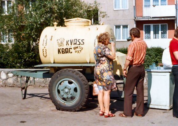 kvass street vendor